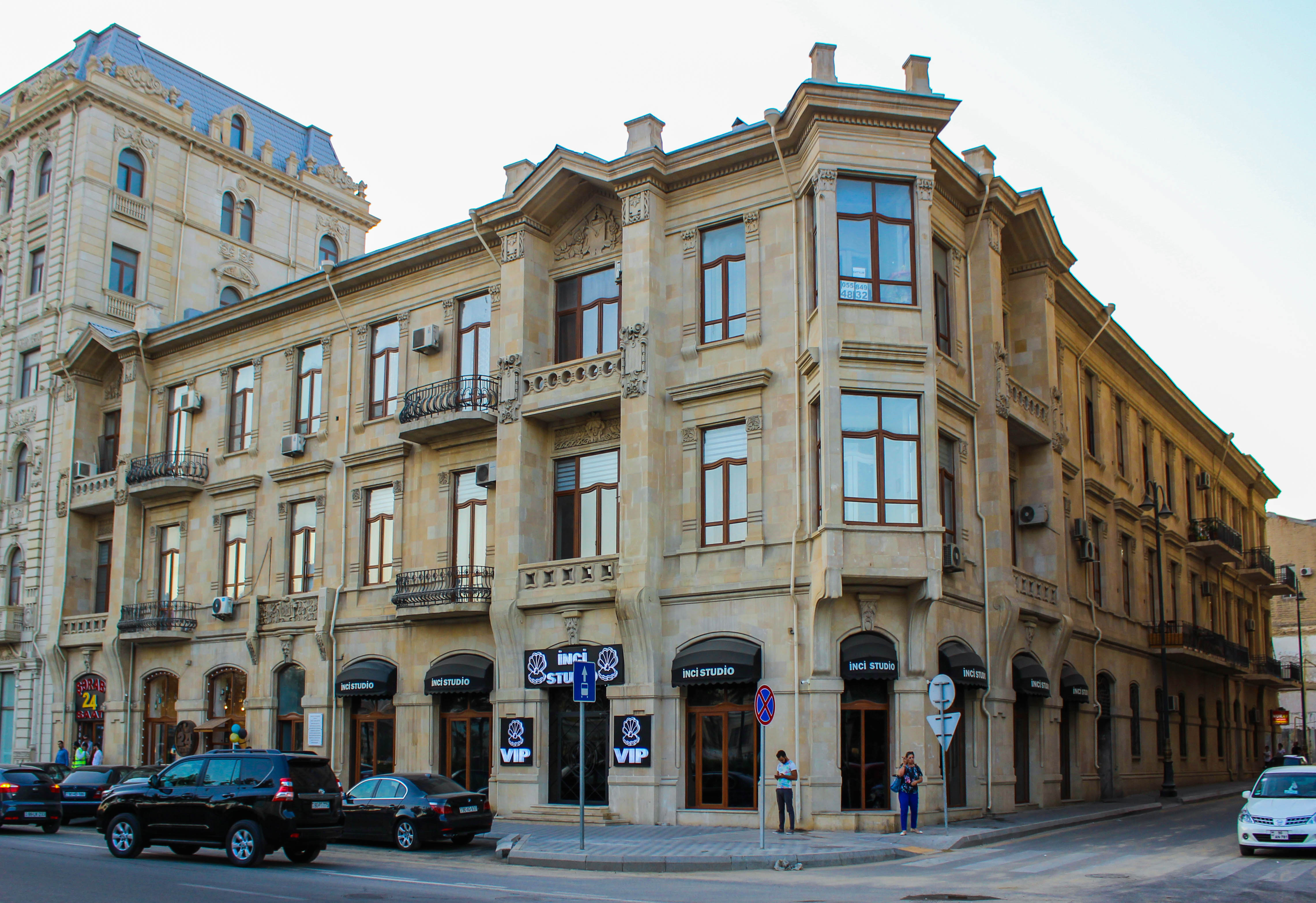 Yaşayış binası, Füzuli küçəsi, 39